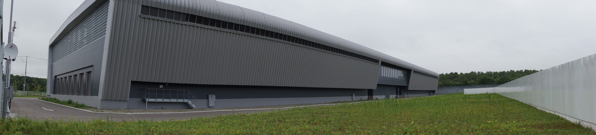 さくらインターネット 石狩データセンター 外観